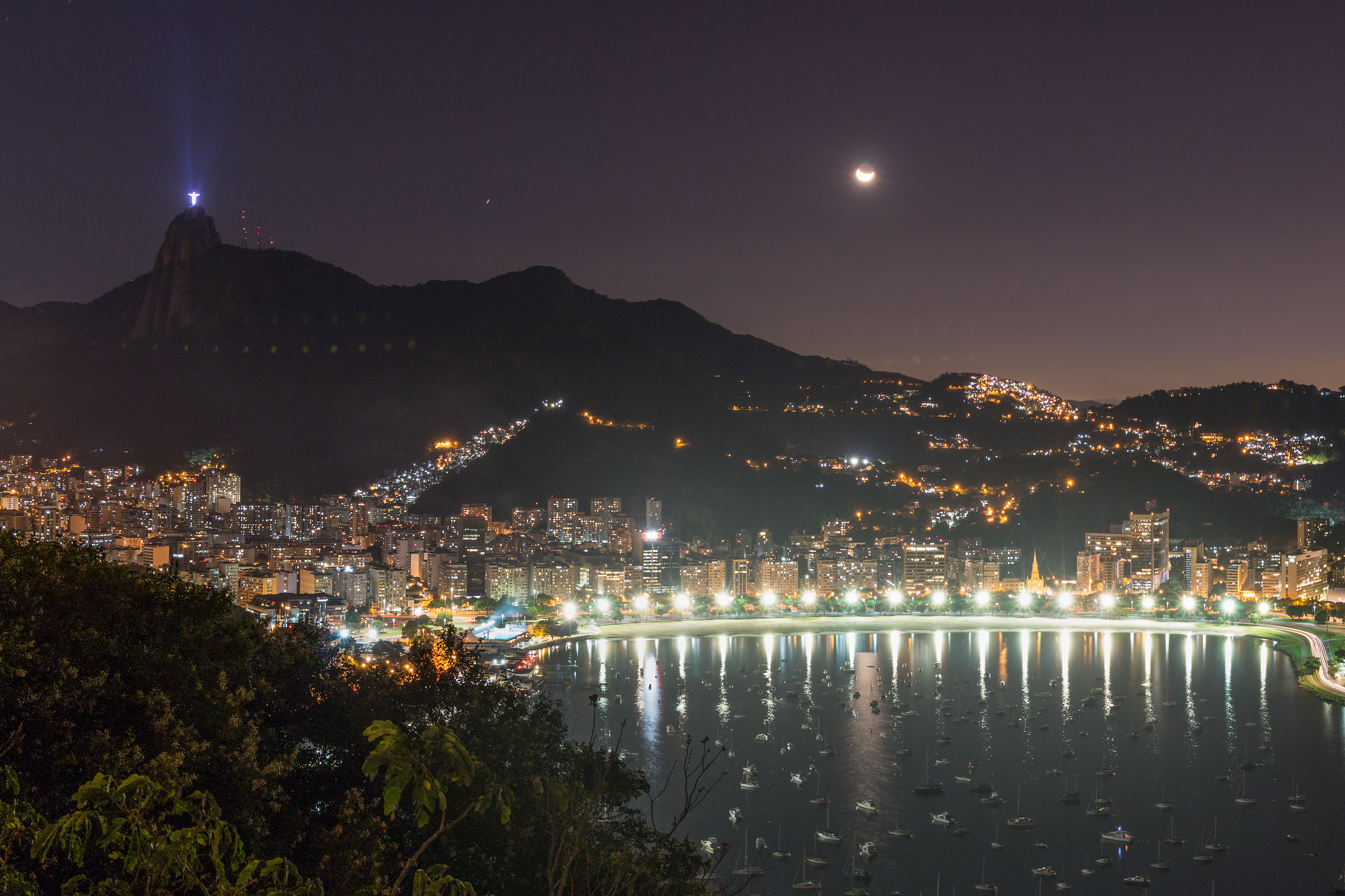 Foto realizada do topo do Morro da Urca, mostrando a beleza noturna da "Cidade Maravilhosa" ao pés de uma das sete maravilhas: o NOSSO Cristo Redentor